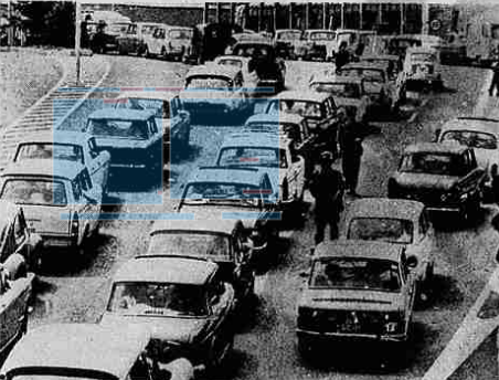 Articolo "La milionesima vettura stamani sotto il Bianco". "stampa Sera" - sabato 18 e domenica 19 marzo 1967, pagina 17